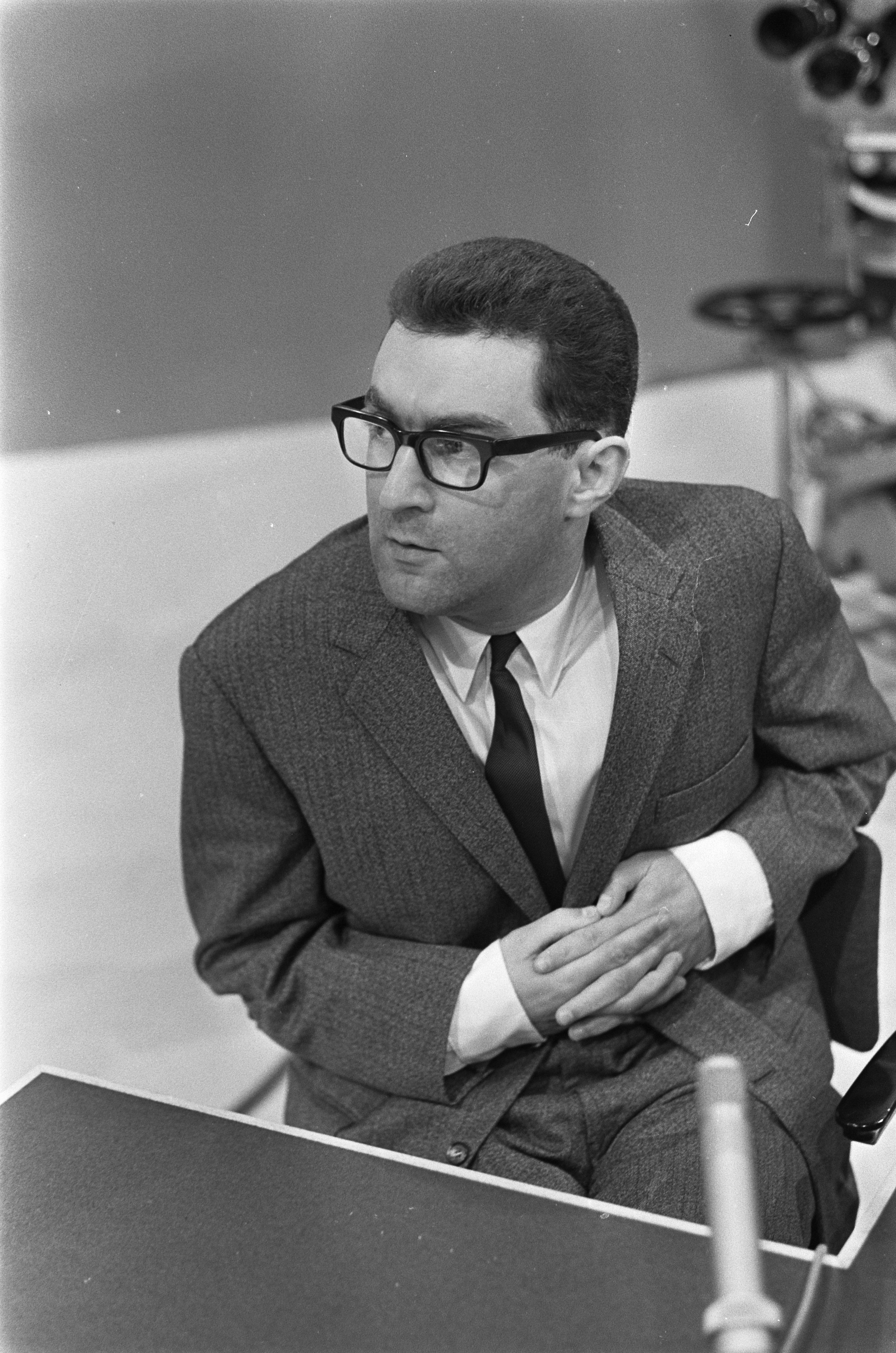 Collectie / Archief : Fotocollectie Anefo Reportage / Serie : [ onbekend ] Beschrijving : Programma van Frits van der Poel . Professor A. Heertje Datum : 20 mei 1968 Trefwoorden : hoogleraren, televisieprogramma's Persoonsnaam : Heertje, Arnold Fotograaf : Nijs, Jac. de / Anefo, [onbekend] Auteursrechthebbende : Nationaal Archief Materiaalsoort : Negatief (zwart/wit) Nummer archiefinventaris : bekijk toegang 2.24.01.05 Bestanddeelnummer : 921-3689